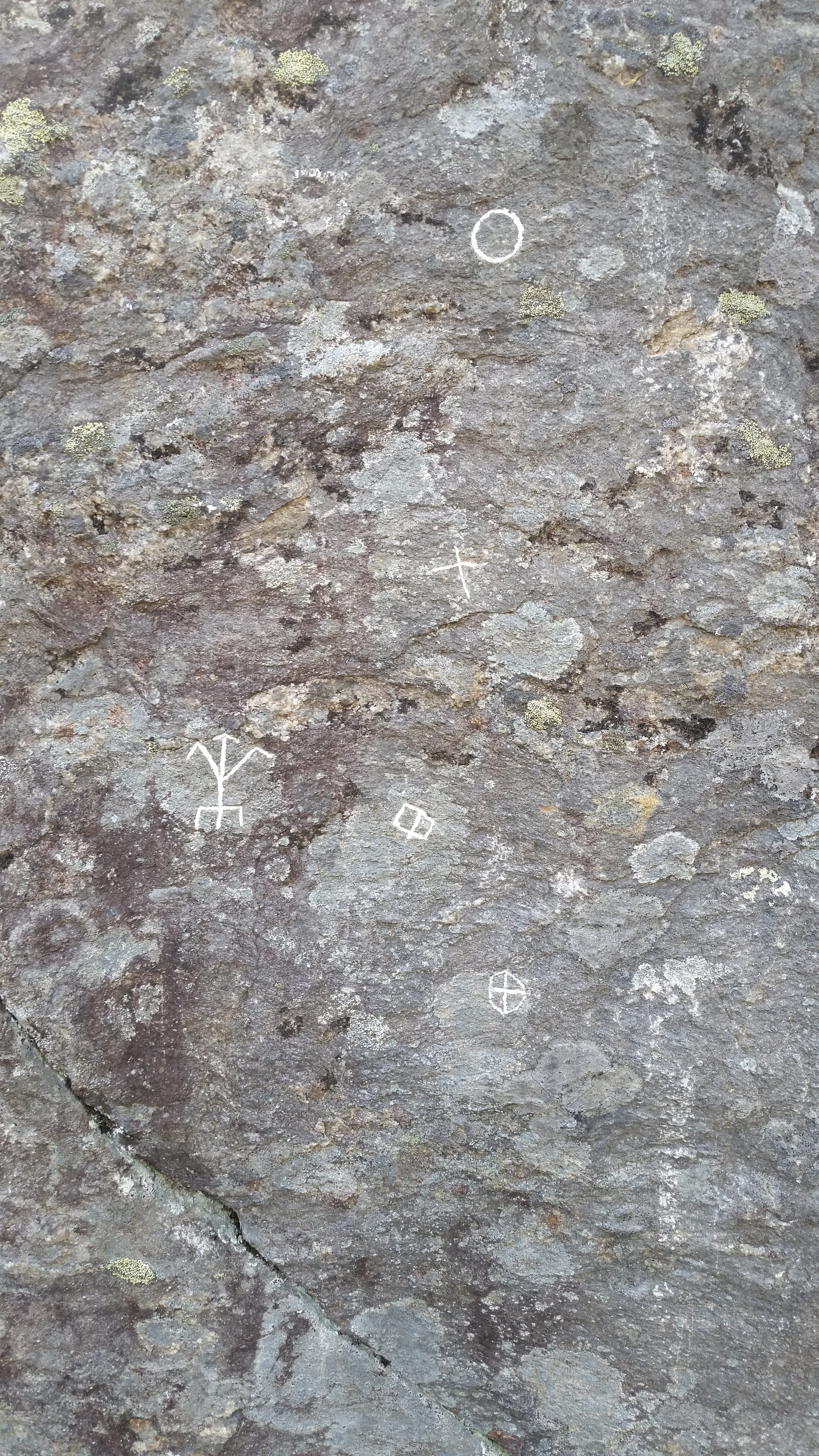 Ristningar på det stora flyttblocket i Stora stenens friluftsområde.